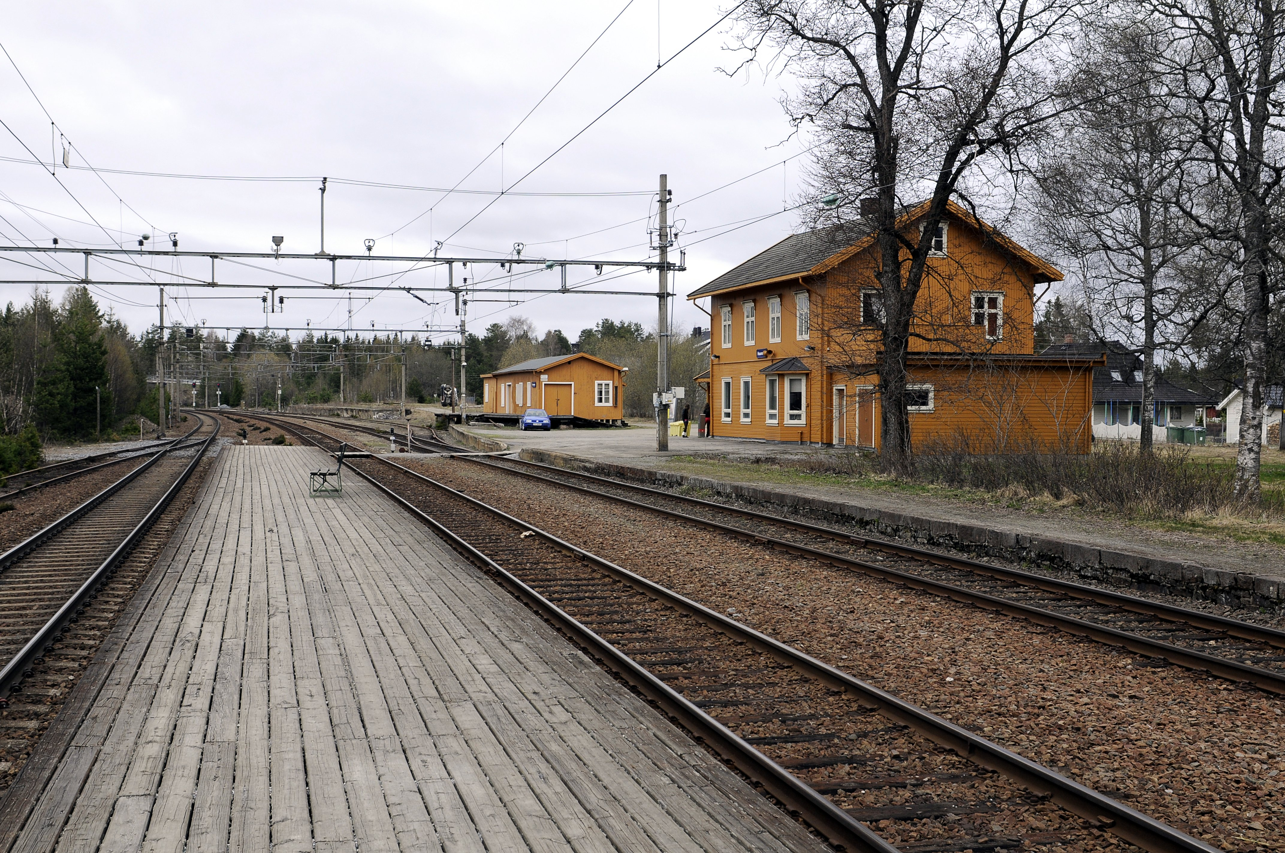 Hauerseter stasjon på Hovedbanen